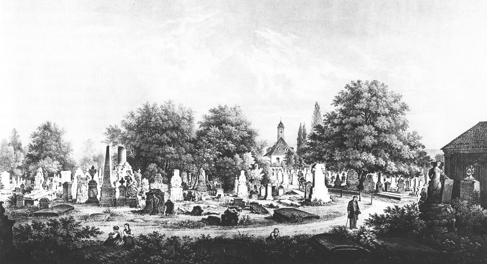 Der alte Johanniskirchhof vor seiner Säkularisierung 1858. Lithografie von Carl Wilhelm Arldt (1809-1868).